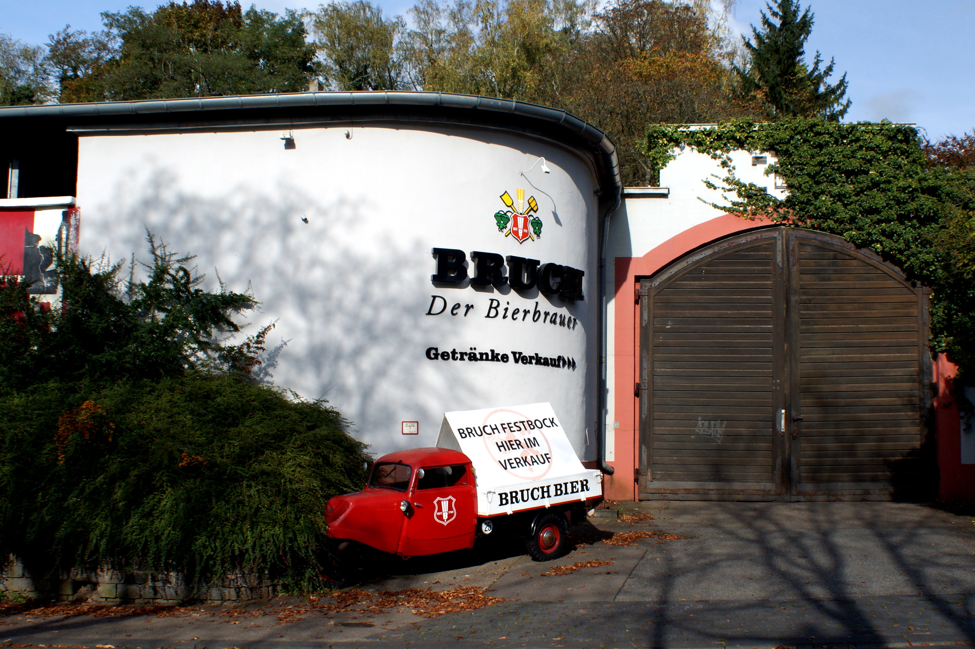 Haupteingang der Bruchbrauerei